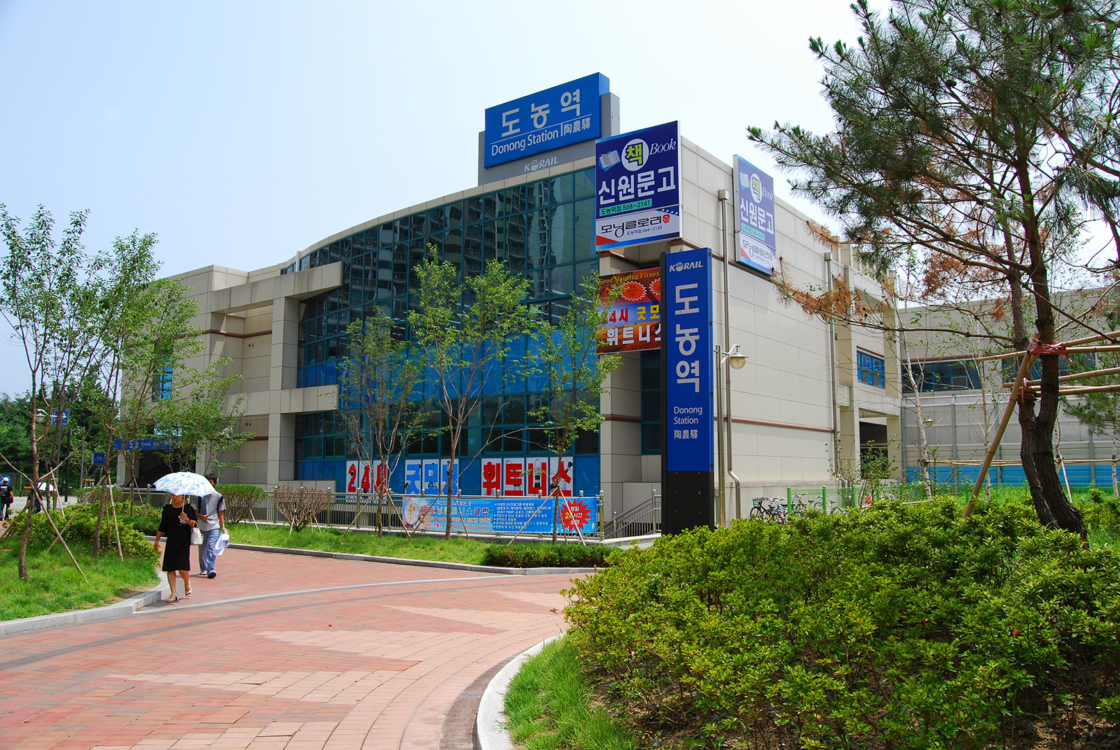 Donong Station